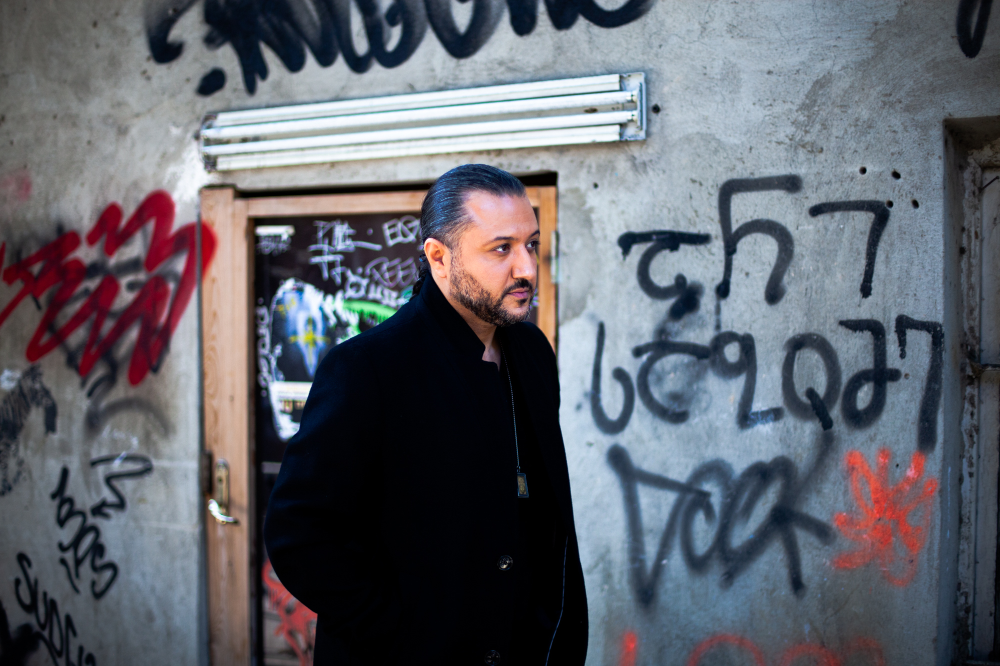 این عکس توسط پوریا افخمی در شهر تفلیس ثبت شده است.